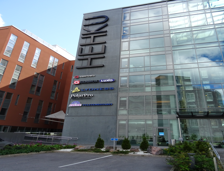 Lyoness Finland toimisto Vantaa, Suomi